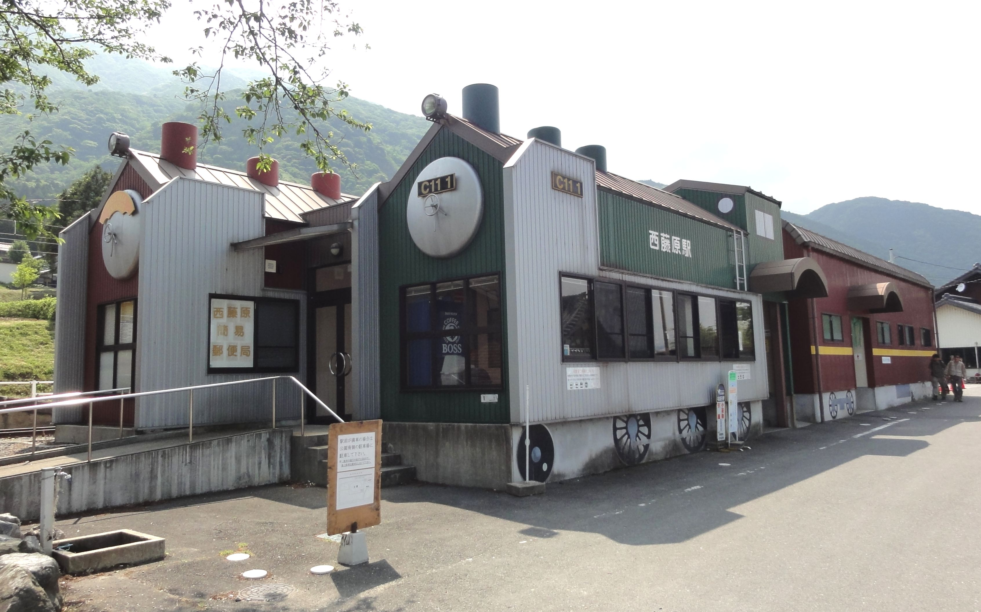 三岐鉄道西藤原駅